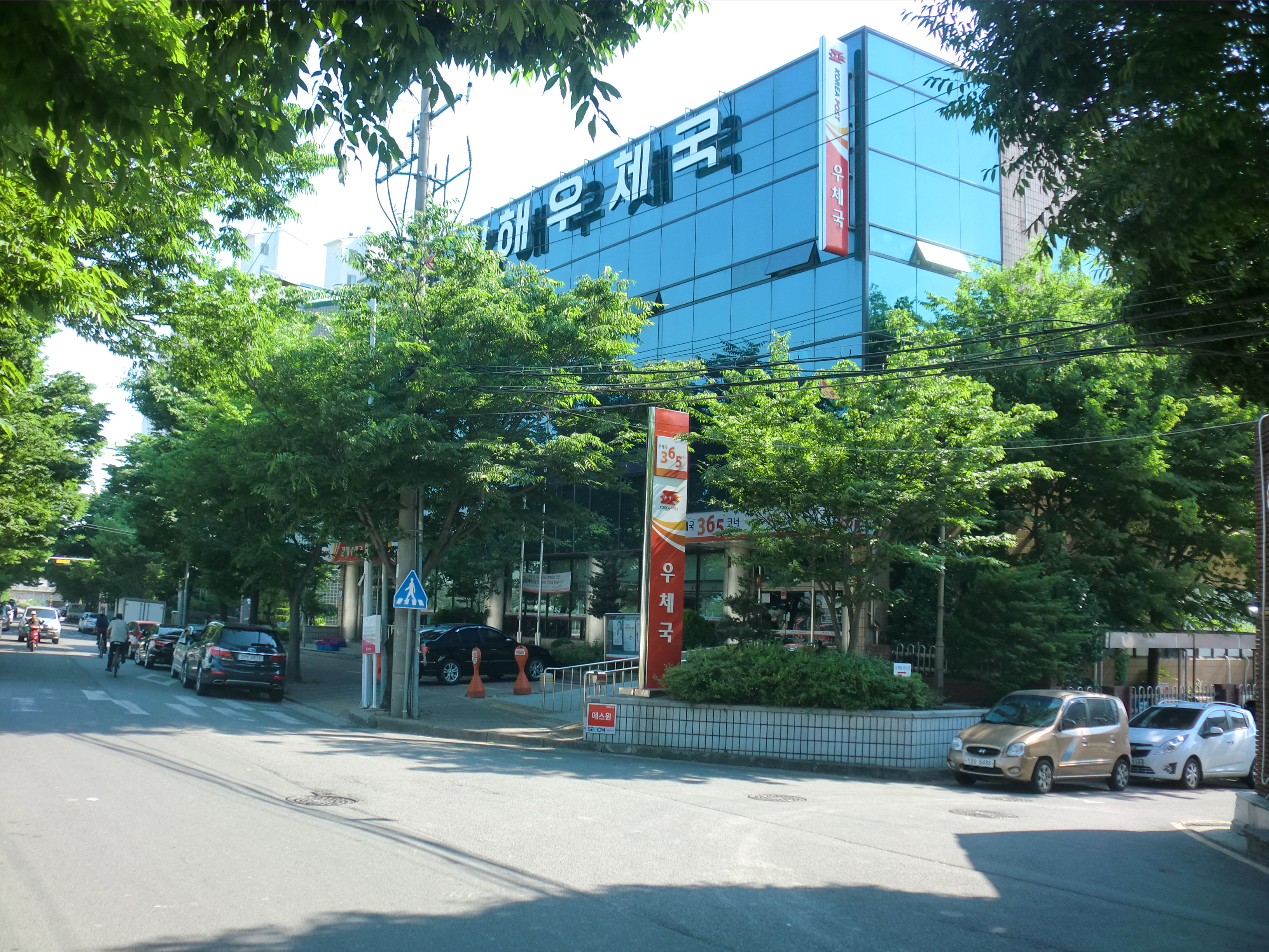 경상남도 김해시에 있는 김해우체국